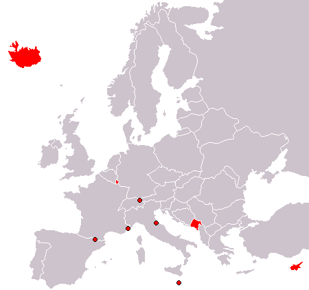 Účastníci her malých zemí